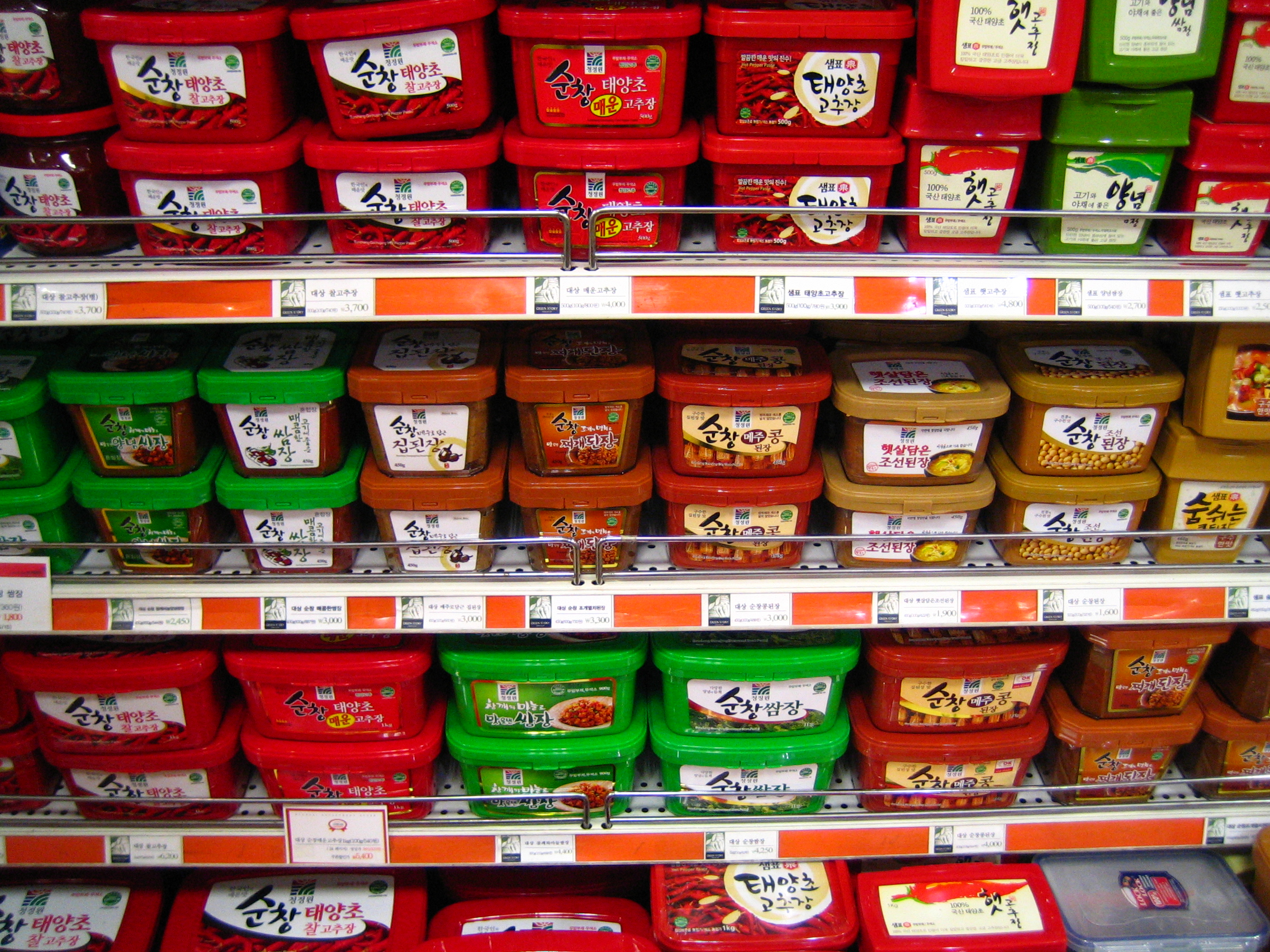 korean chili paste